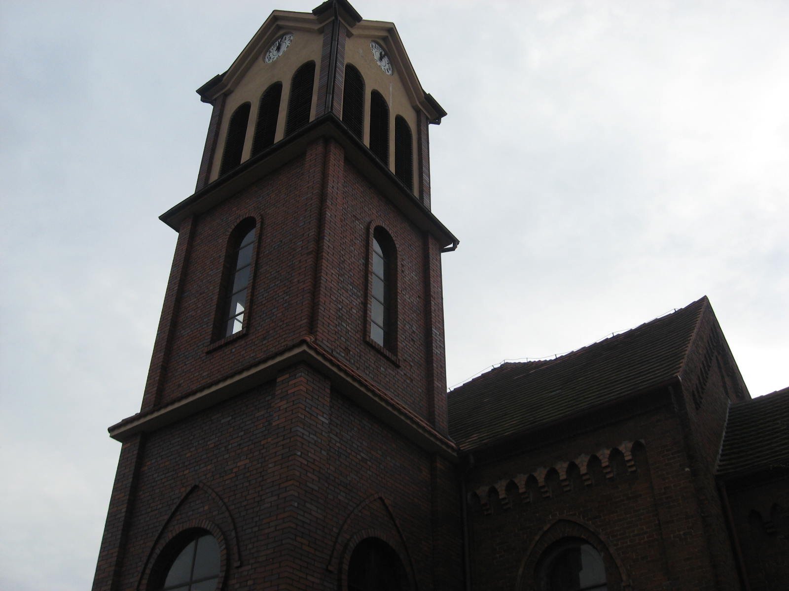 Wieża kościoła 02